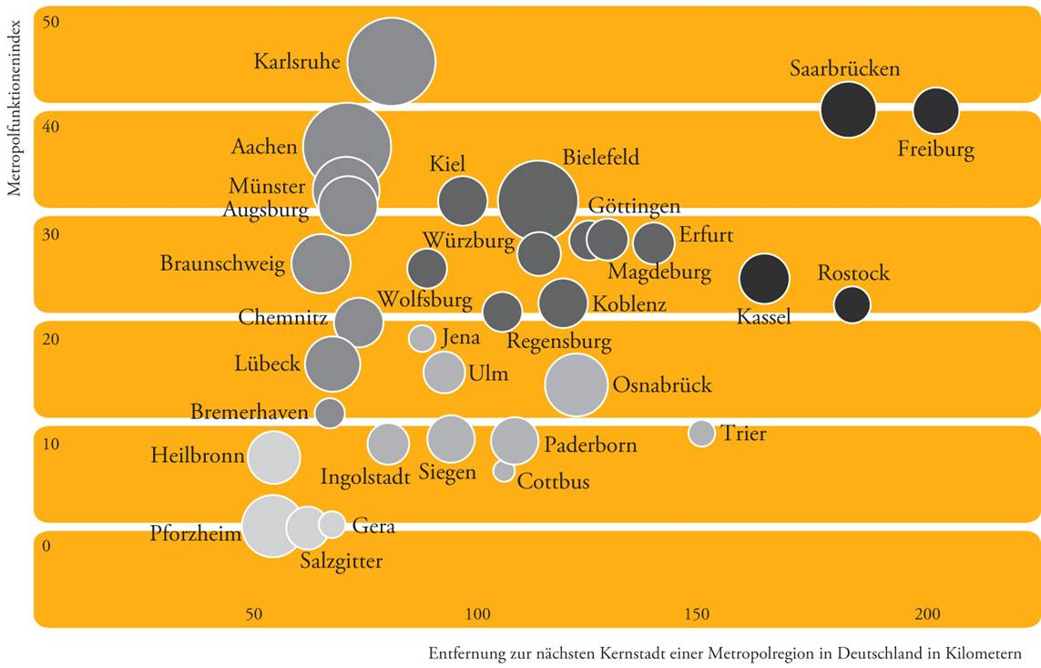 Typisierung der 33 solitären Großstädte nach: Distanz zum nächsten größeren metropolitanen Kern, Masse der Stadt entsprechend regionalem Bevölkerungspotenzial und nach dem Metropolfunktionen-Index.